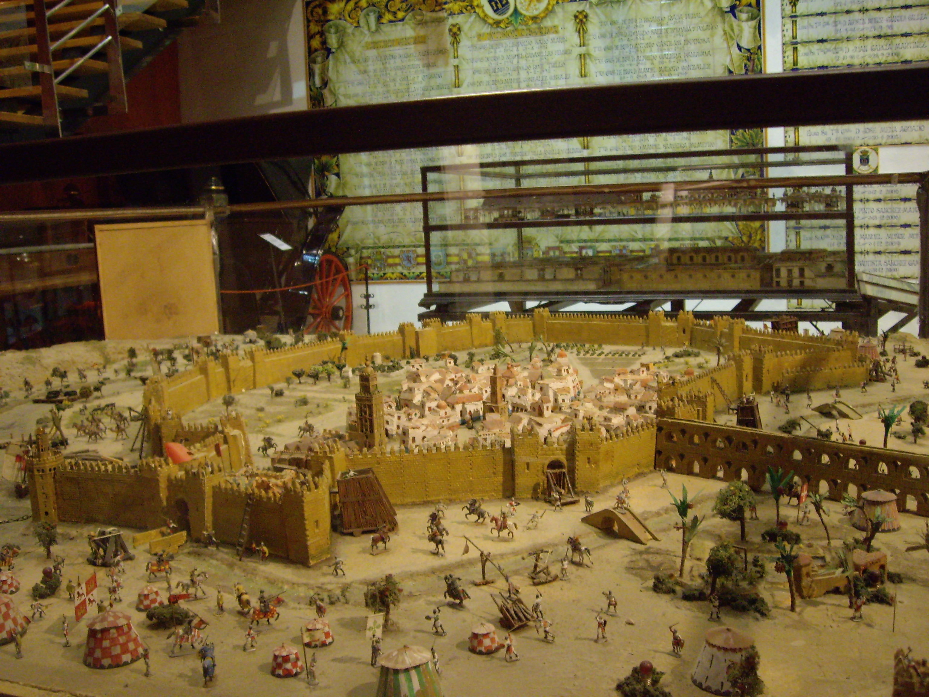 Reconquista de Sevilla por la parte sureste en una maqueta del Museo Histórico Militar de Sevilla, (España).